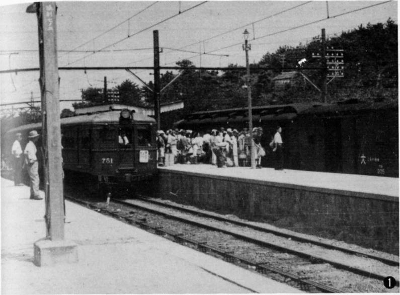 昭和21年の和泉砂川駅。旧阪和電気鉄道クタ750形751が見える。